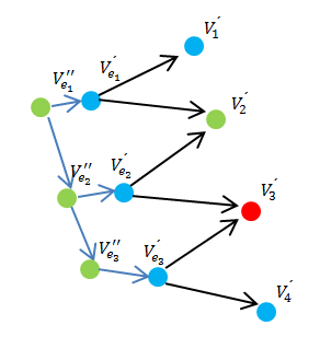 Paso 2 de la contrucción